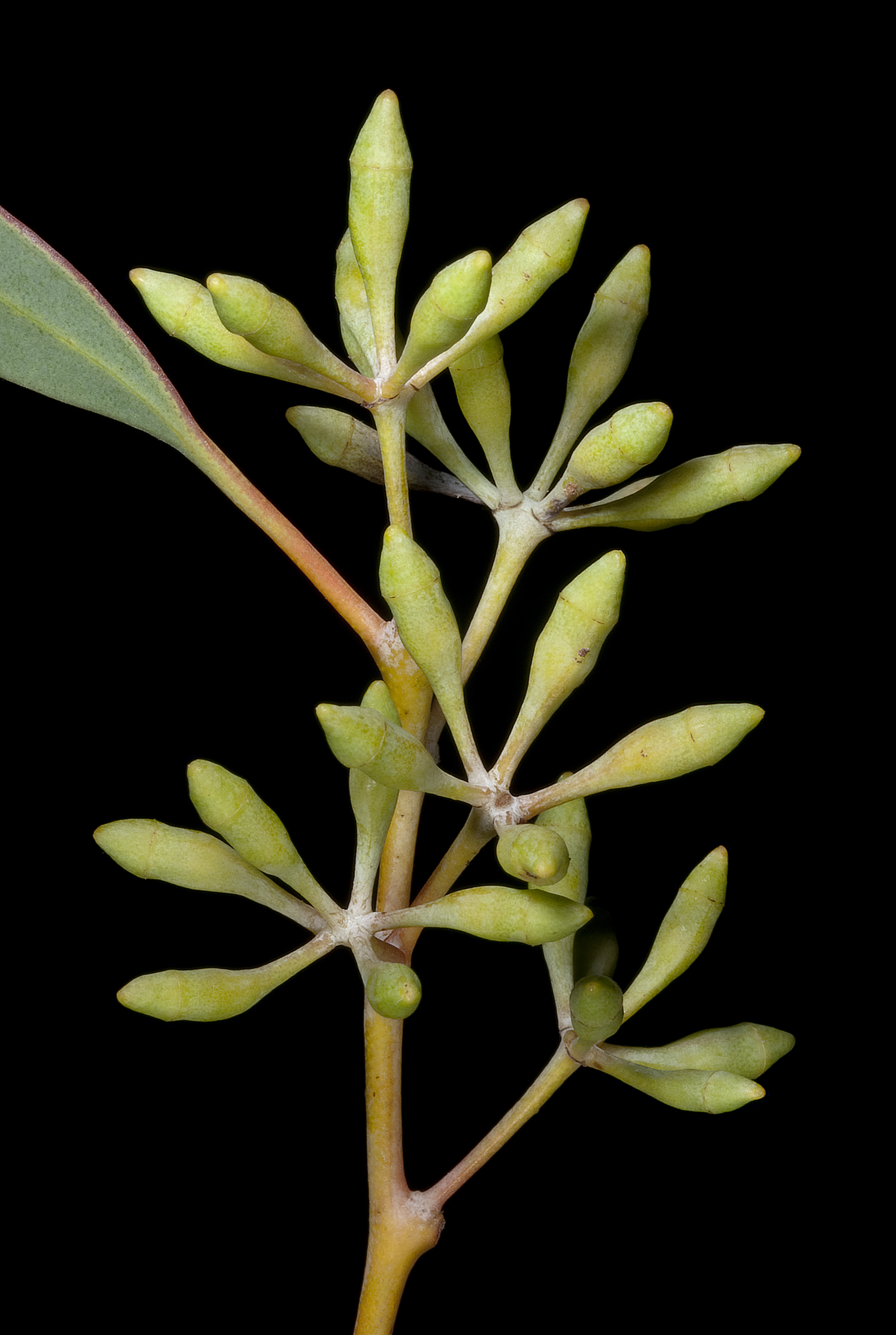 KRT3965